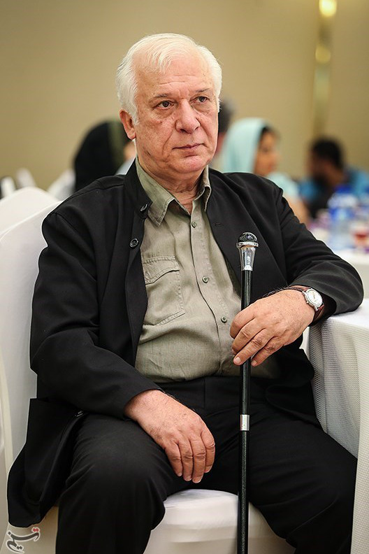 مراسم اعطای گواهینامه درجه یک هنری به ۱۸ نفر از هنرمندان سینما و تقدیر از هیئت‌های انتخاب، داوری و برگزاری بخش بین‌الملل سی‌وسومین جشنواره فیلم فجر در هتل پارسیان آزادی برگزار شد.